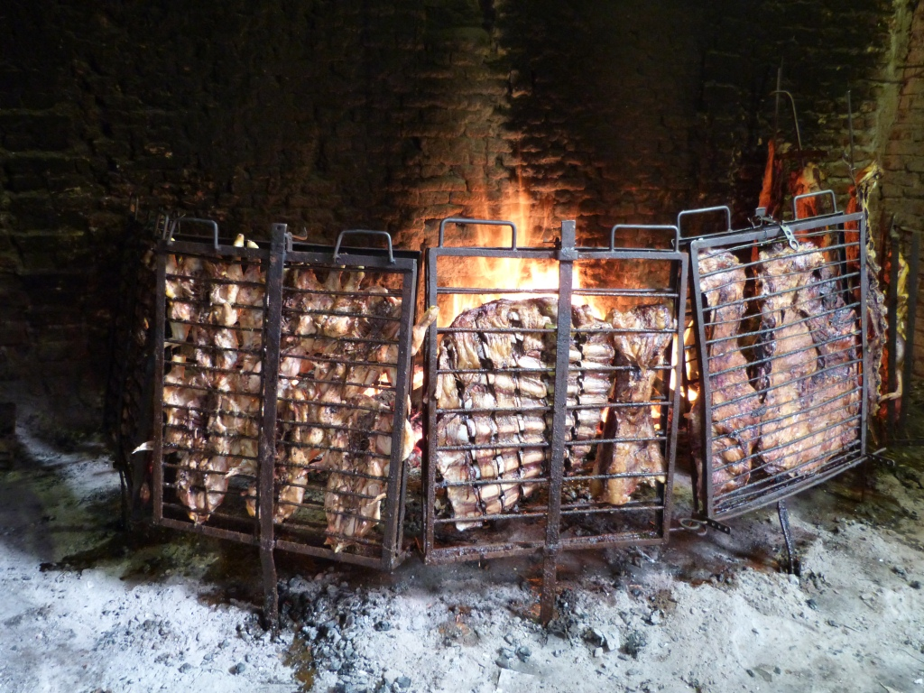 Costillares al asador en Ayacucho, provincia de Buenos Aires.